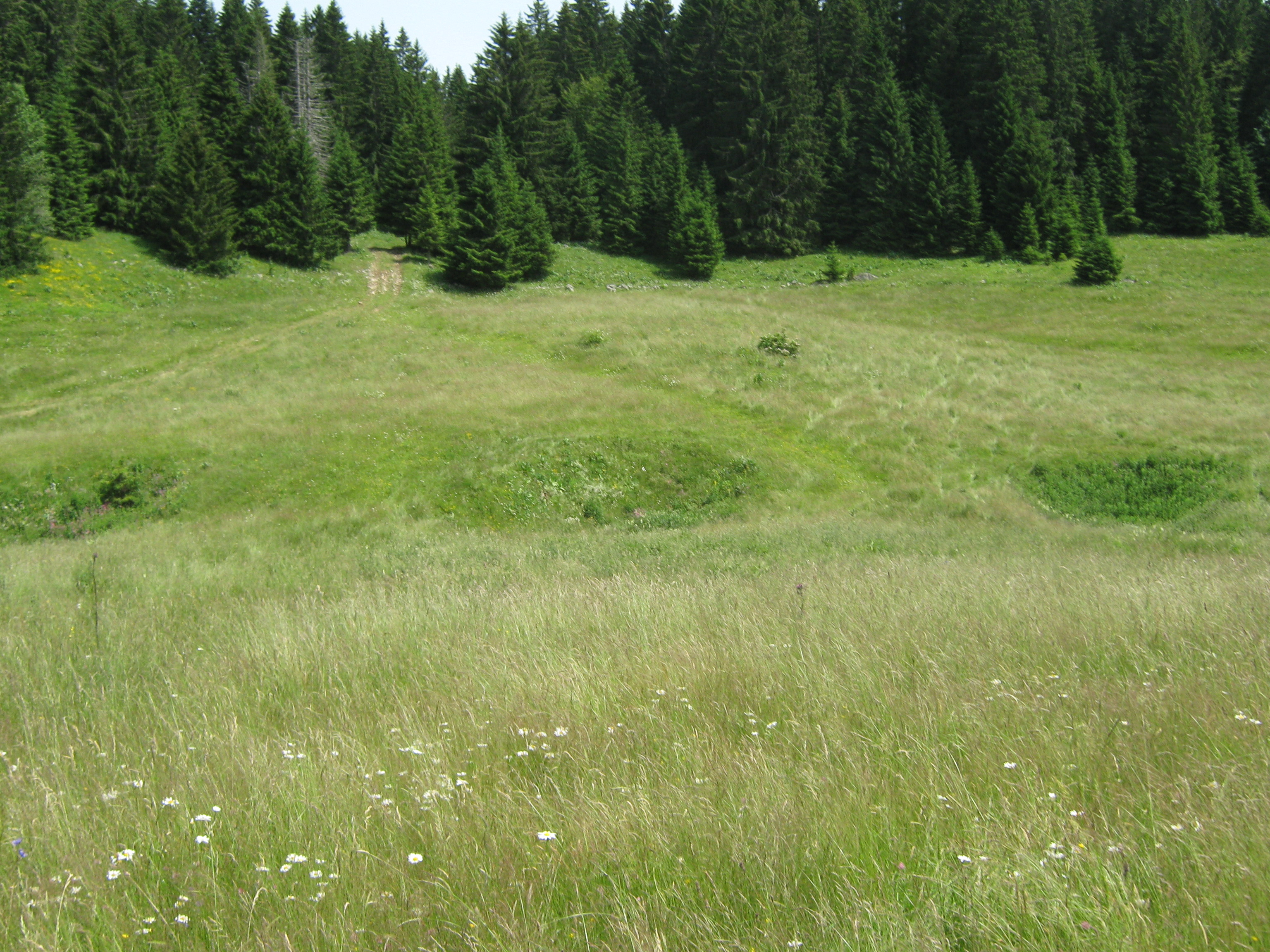 Dolines près de Bellecombe dans le Jura (France)